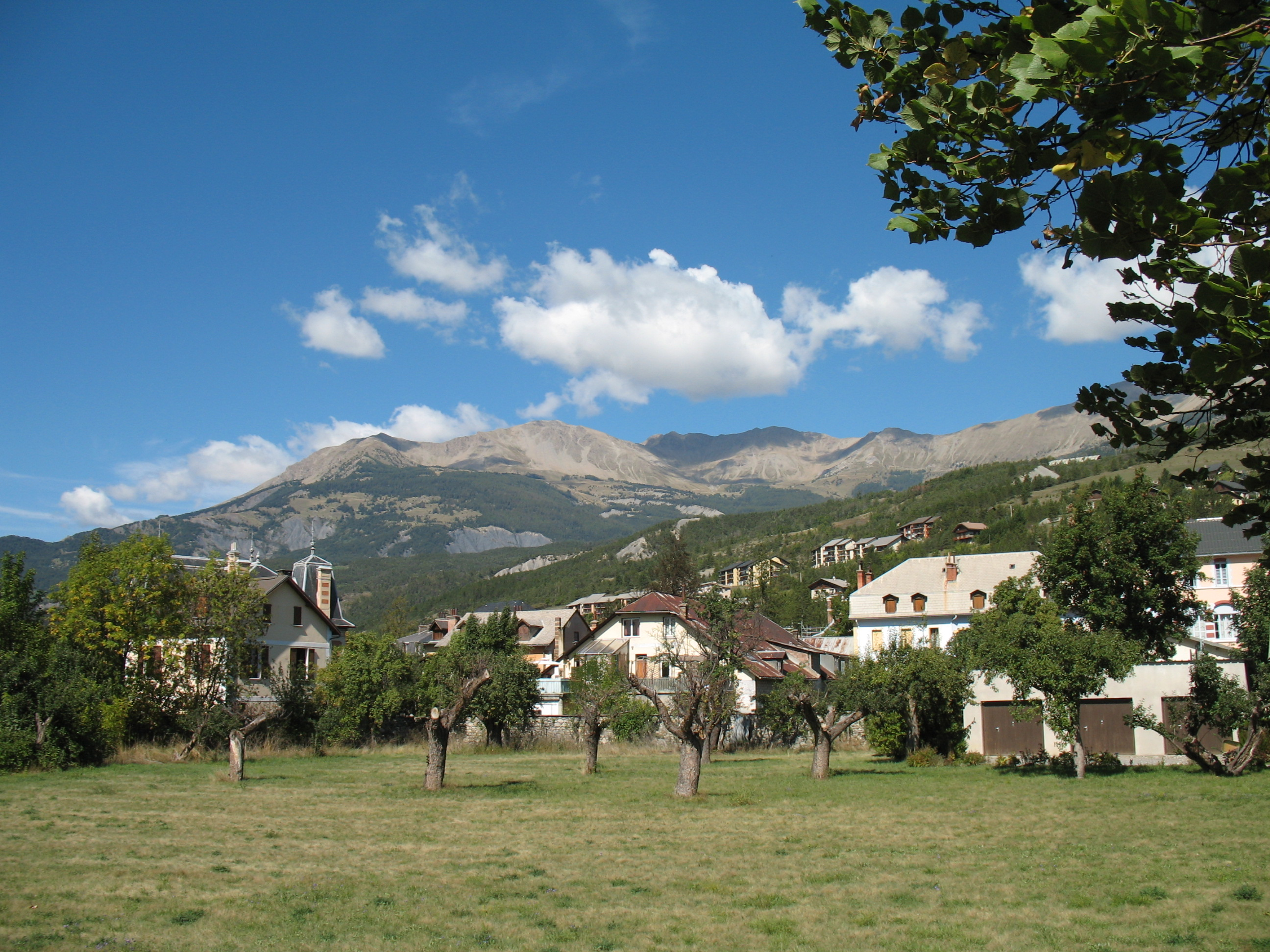 Barcelonnette, département des Alpes-de-Haute-Provence, France